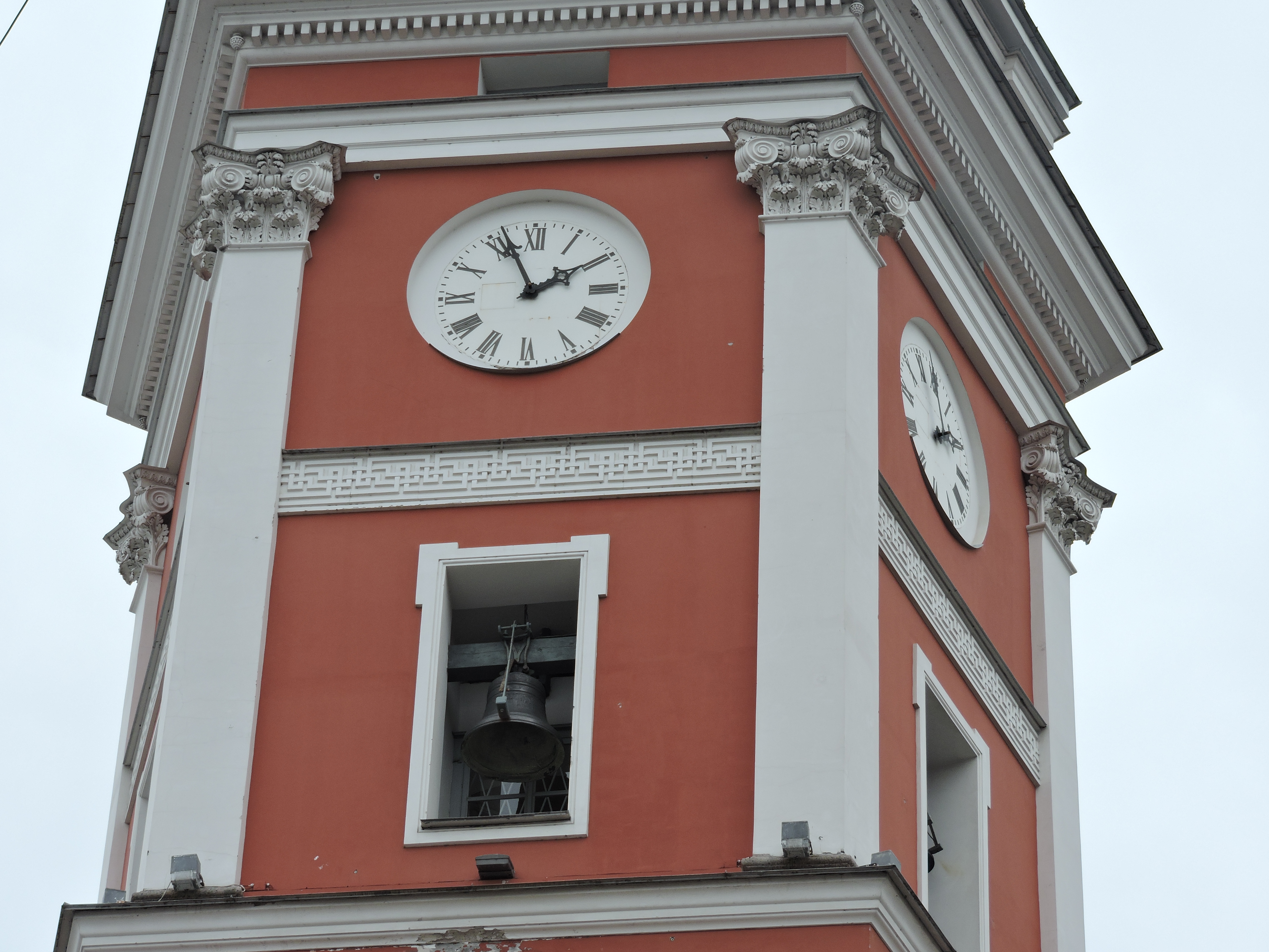 Куранты питерской гордумы